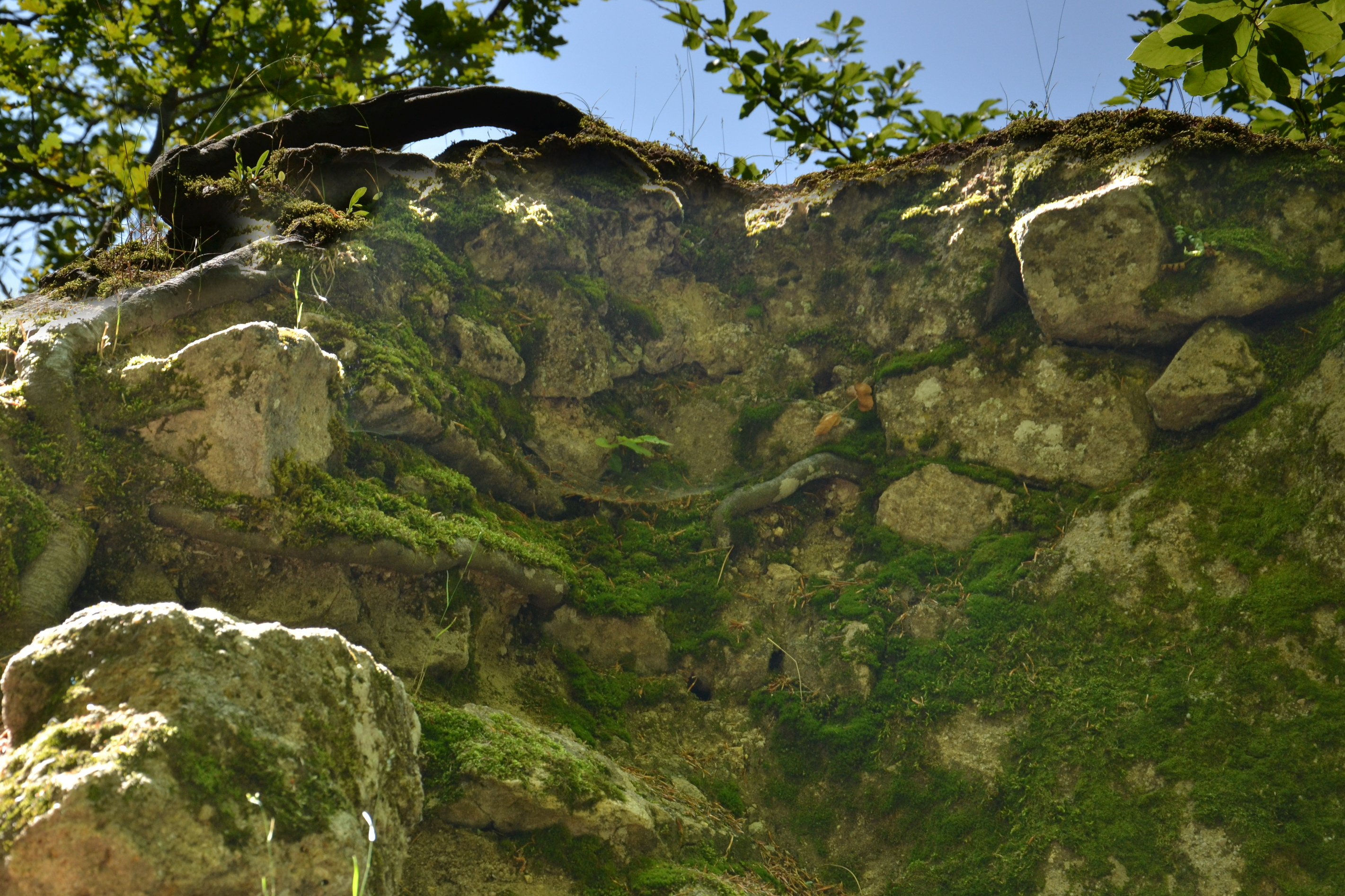 Hrad Pulčín – fragment zdiva v místech jižního nároží obytné věže